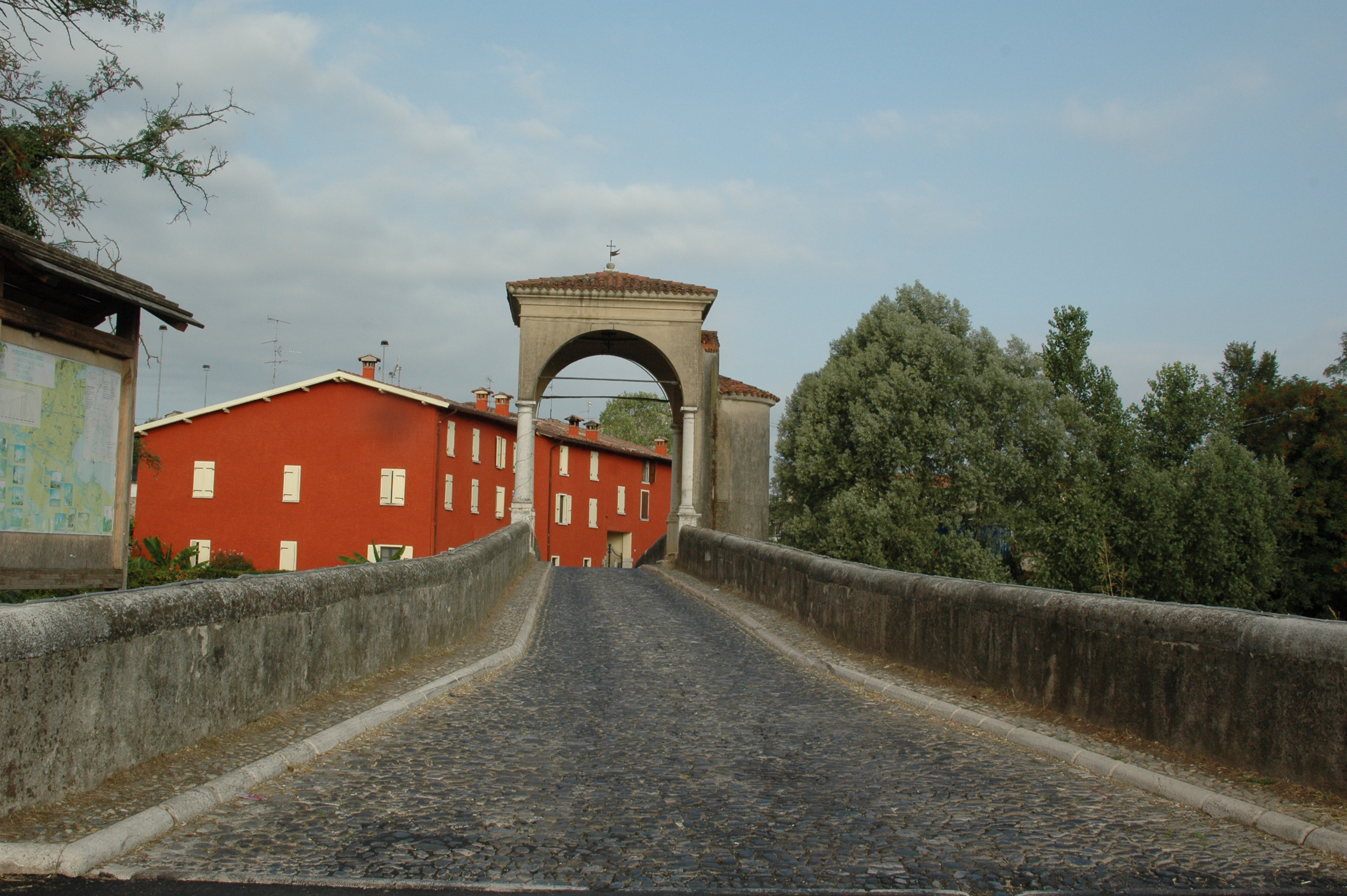 Il ponte di Pontenove (Bedizzole, Italia)